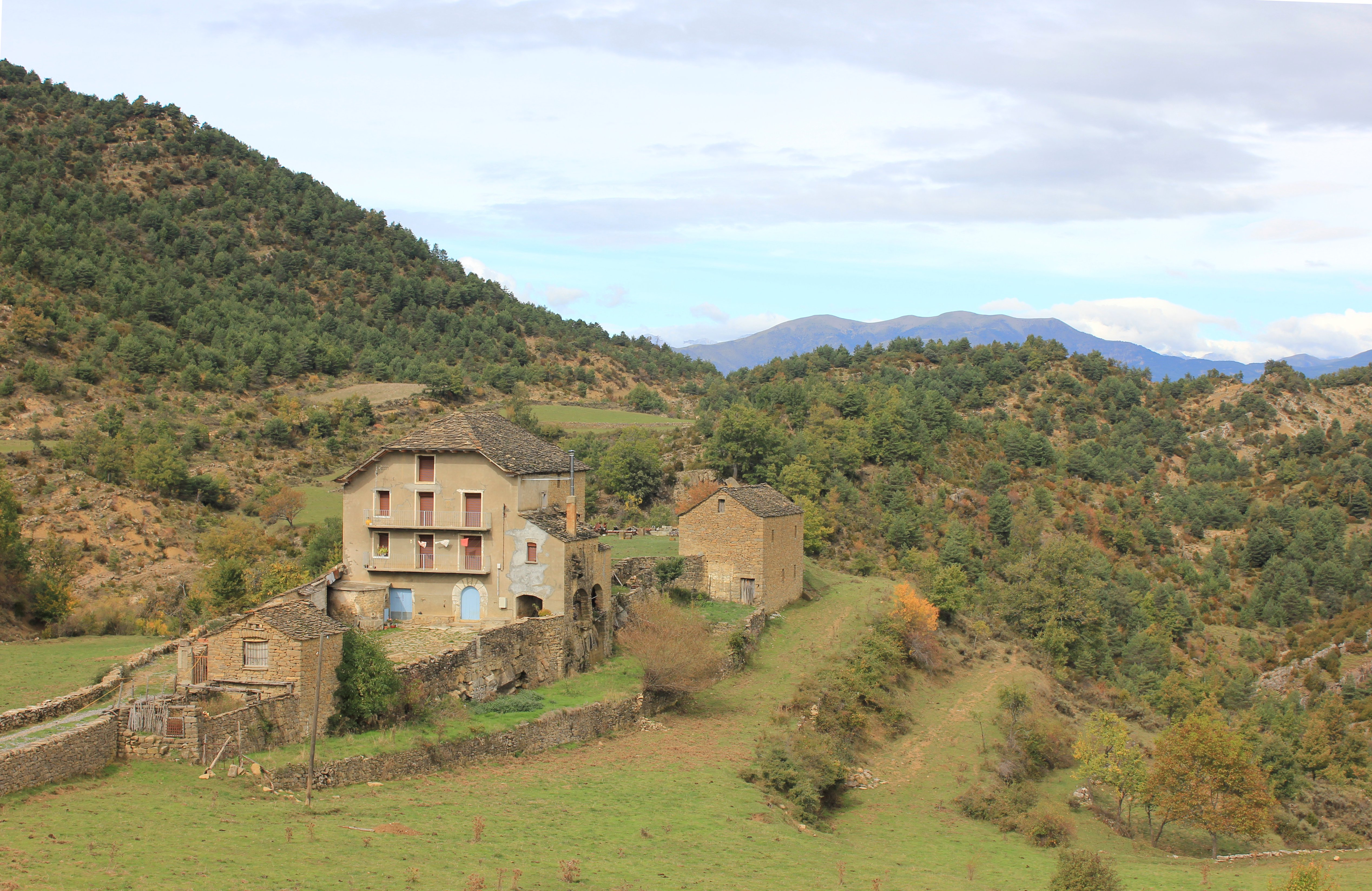 Aragonés: O Mesón de Fuévola, d'entre Campodarbe y o Puerto de Sarrablo.